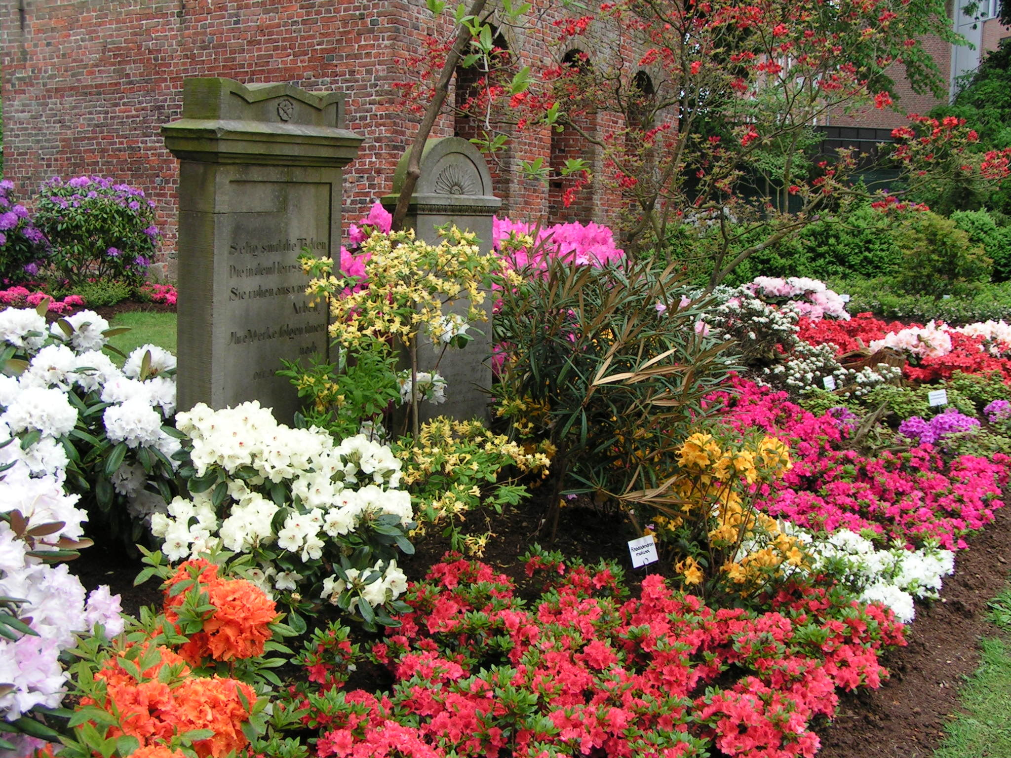 Ausstellung Rhodo 2006 in Westerstede